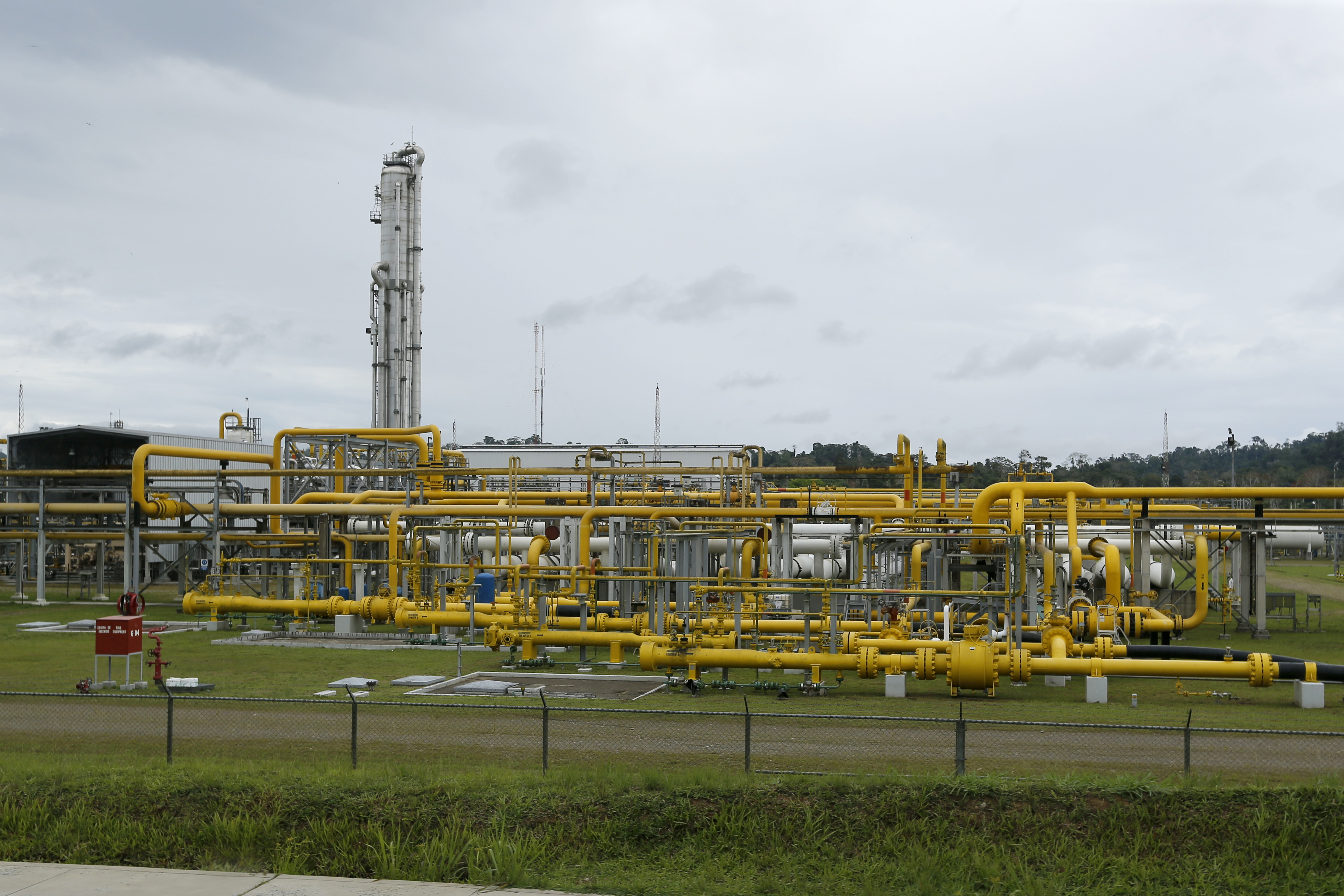 El Ministro de Defensa, Jakke Valakivi, acompañado por el Jefe del Comando Conjunto de las Fuerzas Armadas, Almirante Jorge Moscoso, visitó el eje energético de La Convención en Cusco. En su recorrido supervisó el buen funcionamiento de la planta Malvinas del Consorcio Camisea, la Base Logística Ticumpinia del Gasoducto Sur Peruano S.A. y la Base Transportadora Gas Perú (TGP) en Kiteni, donde las Fuerzas Armadas guardan celosamente la seguridad del desarrollo energético de la Nación.